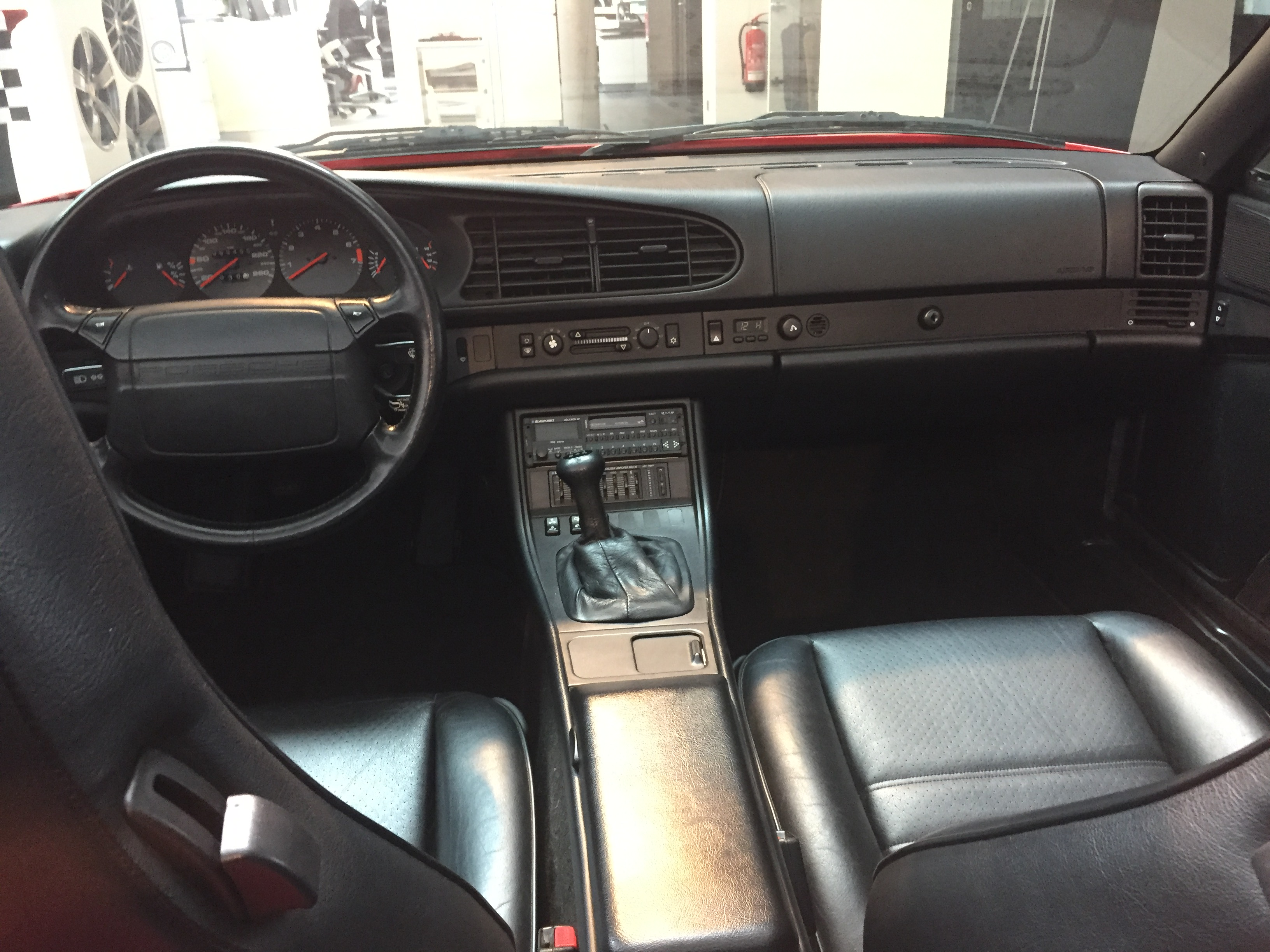 Porsche 944 Cabrio Cockpit